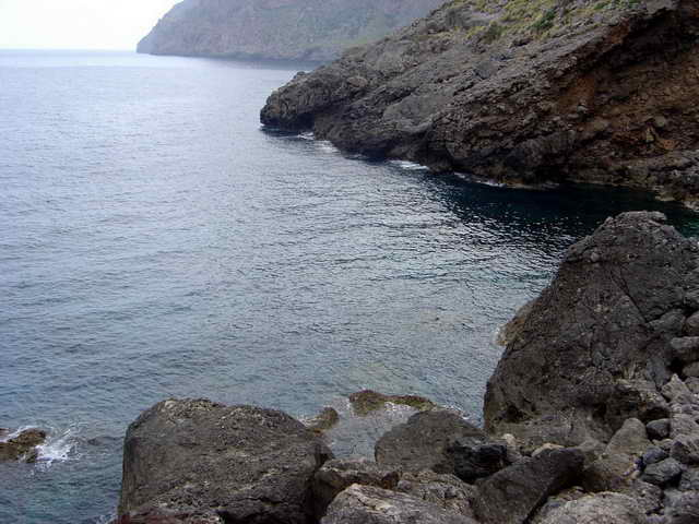 Caleta d'Ariant. Mallorca.